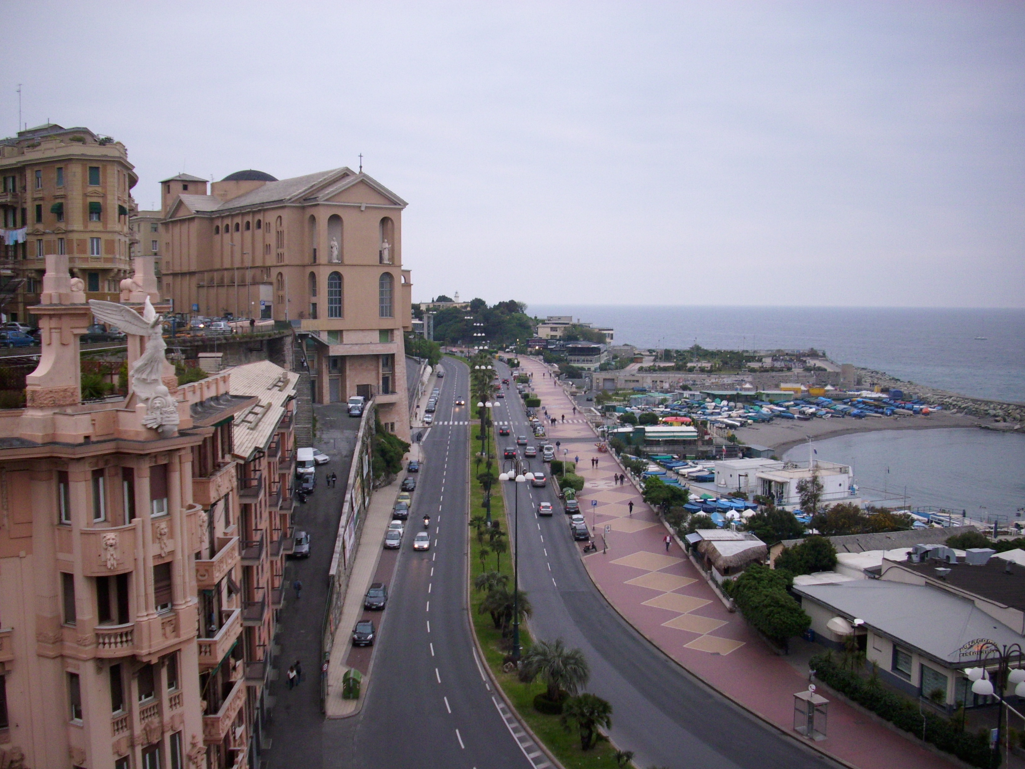 La Chiesa dei Santi Pietro e Bernardo alla Foce. Sulla destra Corso Italia ed un tratto di spiaggia libera.